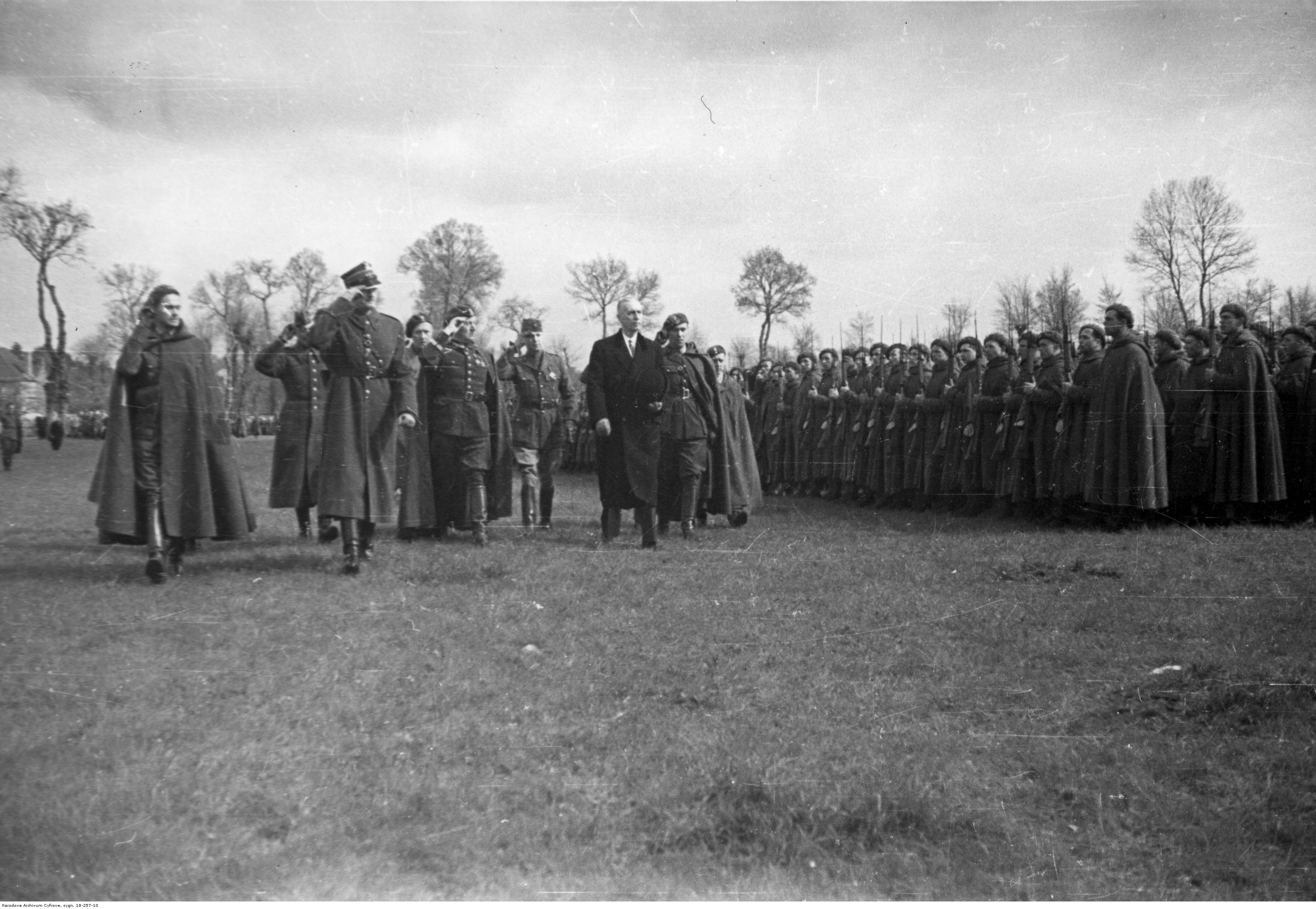 Uroczystość wręczenia sztandaru Samodzielnej Brygadzie Strzelców Podhalańskich - przegląd pododdziałów Brygady; Malestroit, 10 kwiecień 1940 r. Od lewej: NN, NN, NN, mjr Jerzy Borkowski, gen. Władysław Sikorski, płk. dypl. Aleksander Kędzior, prezydent RP Władysław Raczkiewicz, płk. Zygmunt Bohusz-Szyszko. Archiwum Fotograficzne Czesława Datki. Sygnatura: 18-257-10